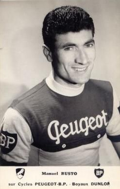 Manuel Busto, coureur cycliste